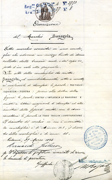 Documento con la descrizione del marchio Sanagola (AS Catania, Prefettura, Serie I, el. 28, b. 231894 marzo 27, 1894)